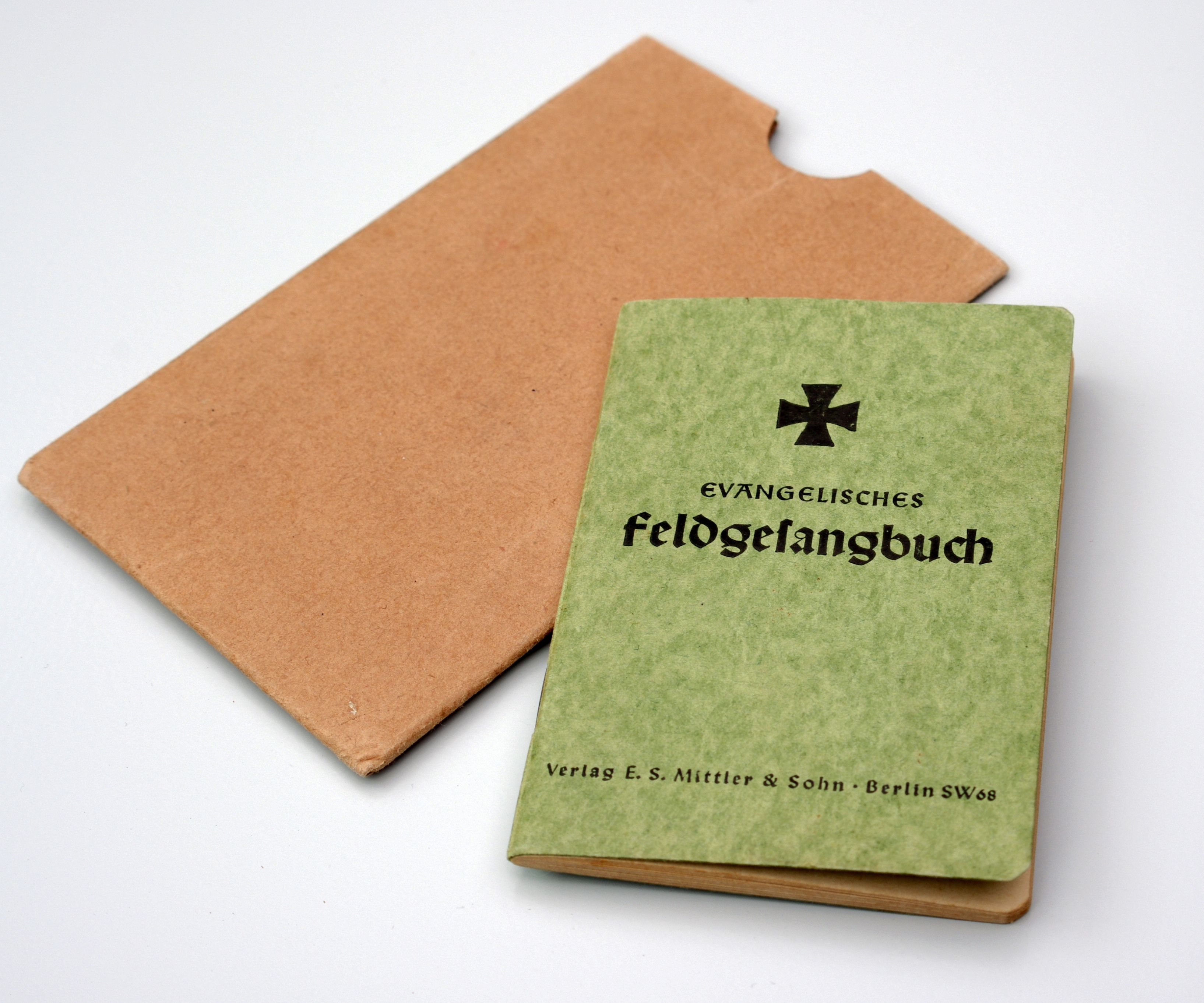 Evangelisches Feldgesangbuch